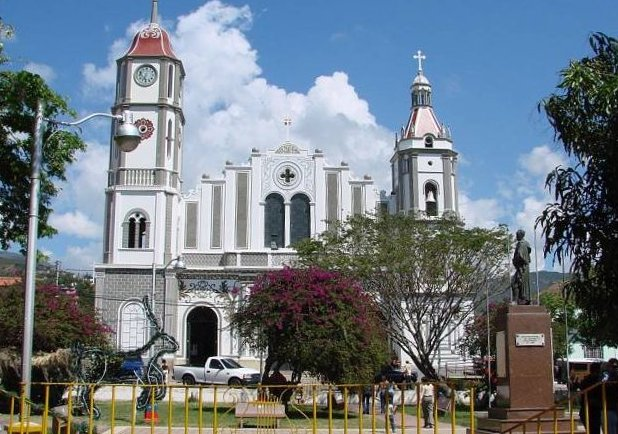 Foto tomada en la población de Carache, por mi.